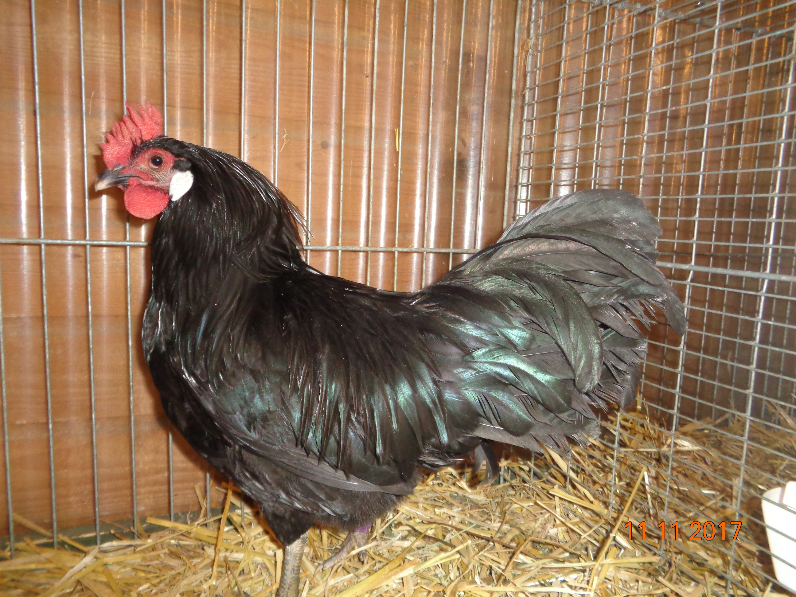 Coq rare